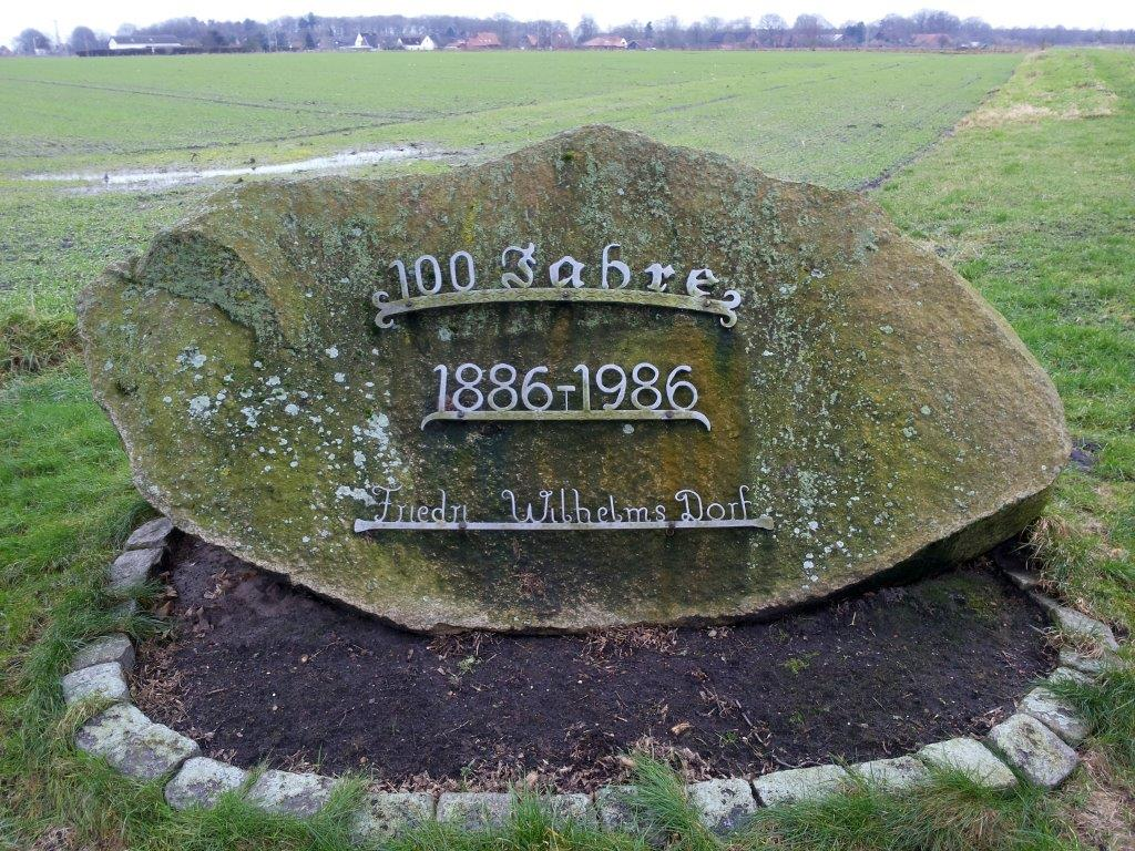 Gedenkstein für die Gründung der Moorkolonie Friedrich-Wilhelms-Dorf bei Düring durch Eberhard Cronemeyer.